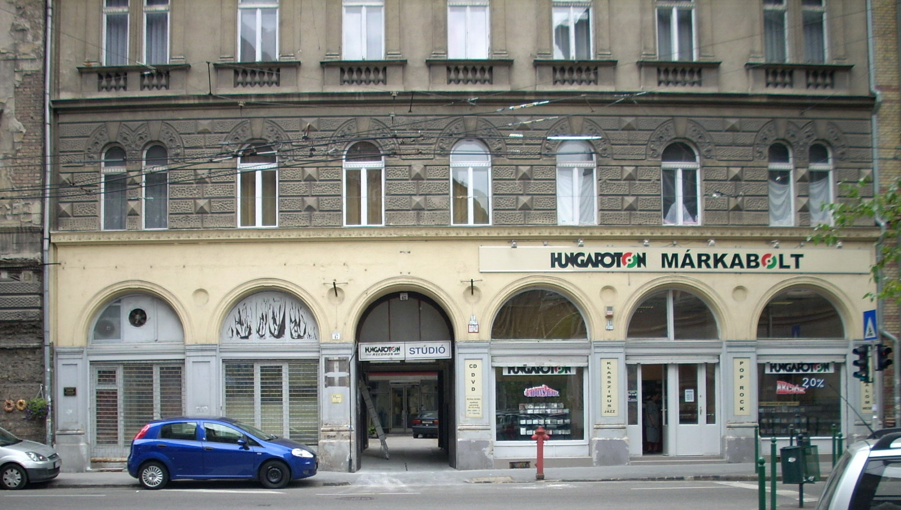 A Hungaroton stúdióját rejtő lakóház, Rottenbiller utca 47, Budapest VII. kerületében